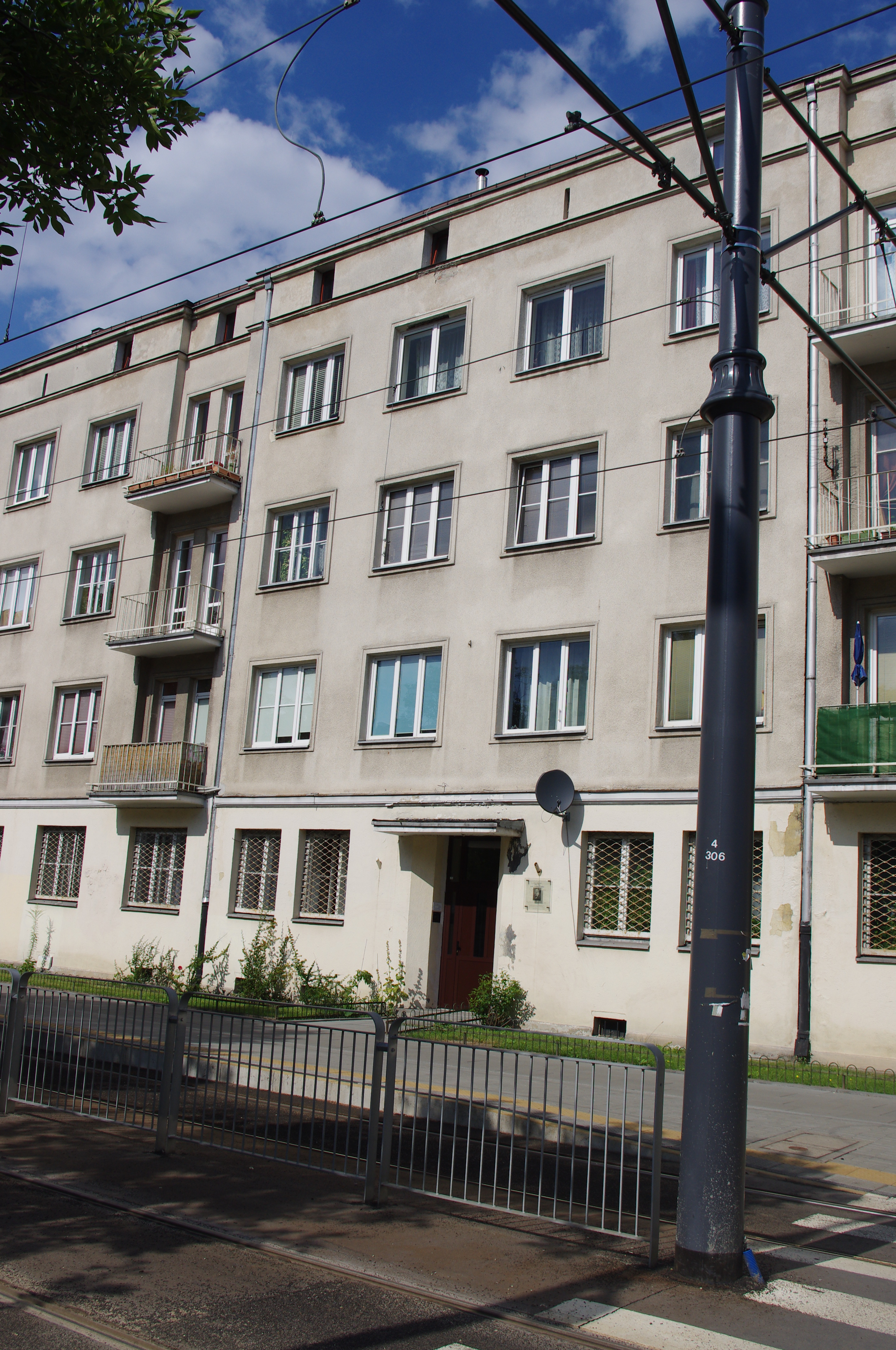 Budynek przy ul. Mickiewicza 18 w Warszawie, gdzie przez blisko 30 lat mieszkał poeta Jerzy Zagórski